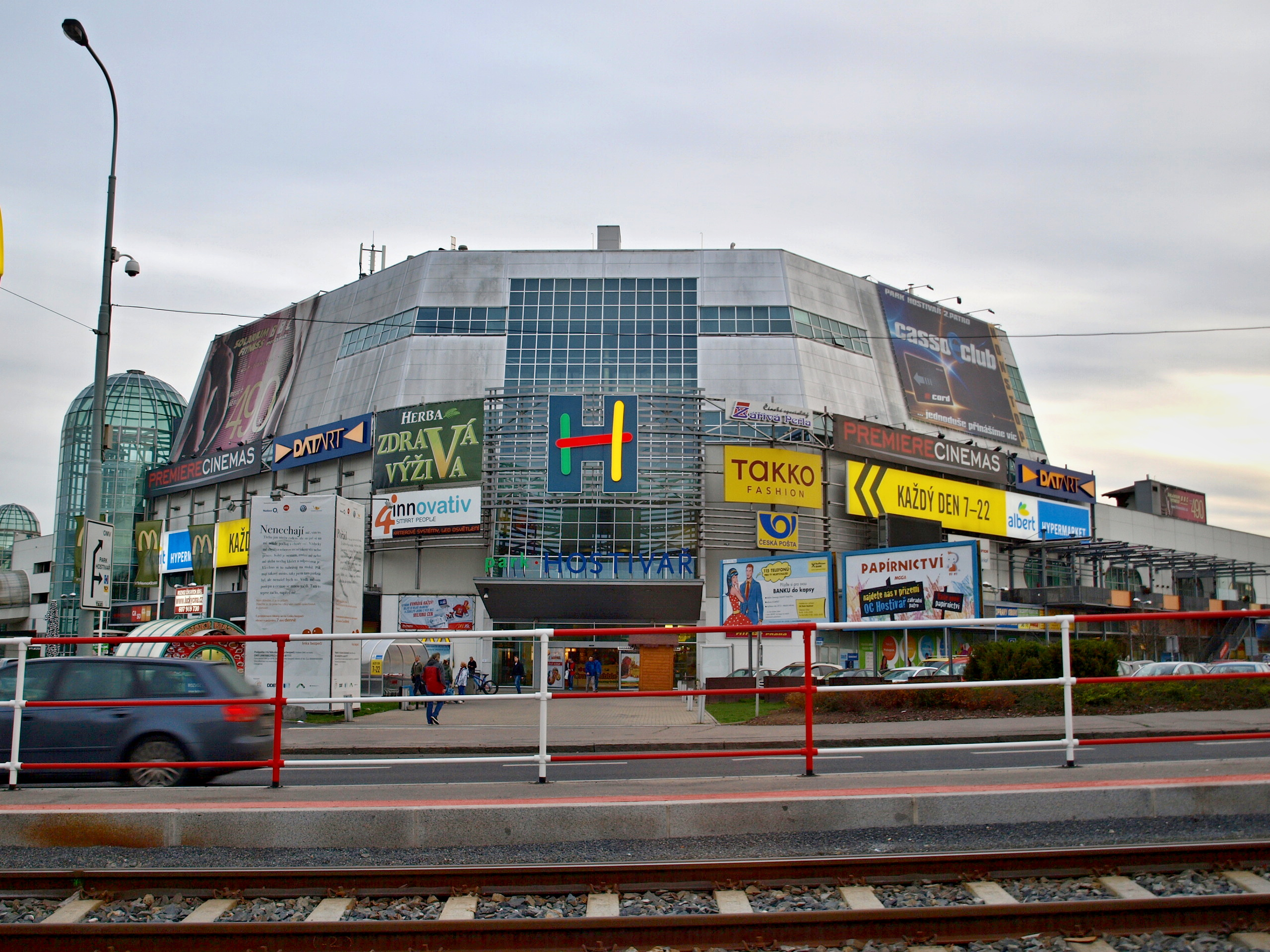 OC Park Hostivař